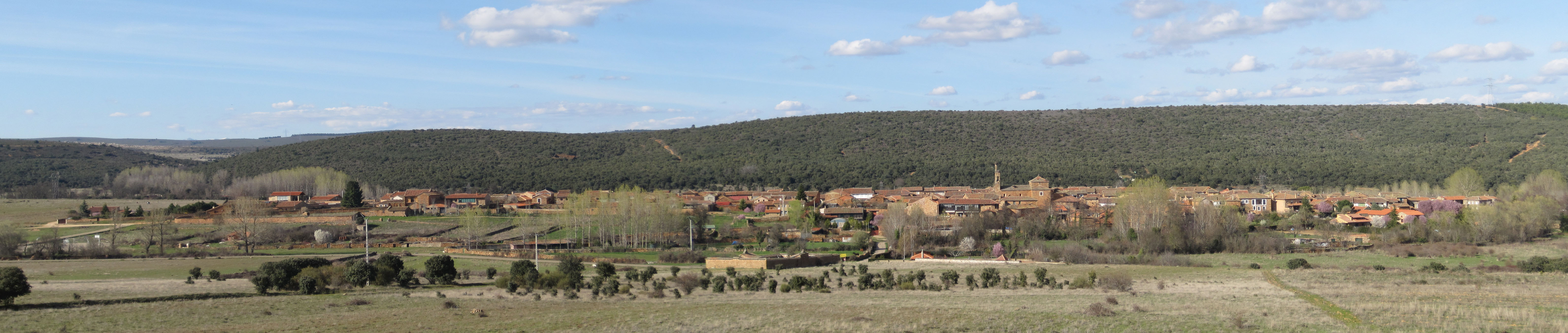 Vista panorámica de Castrillo de los Polvazares (Astorga, León, España).